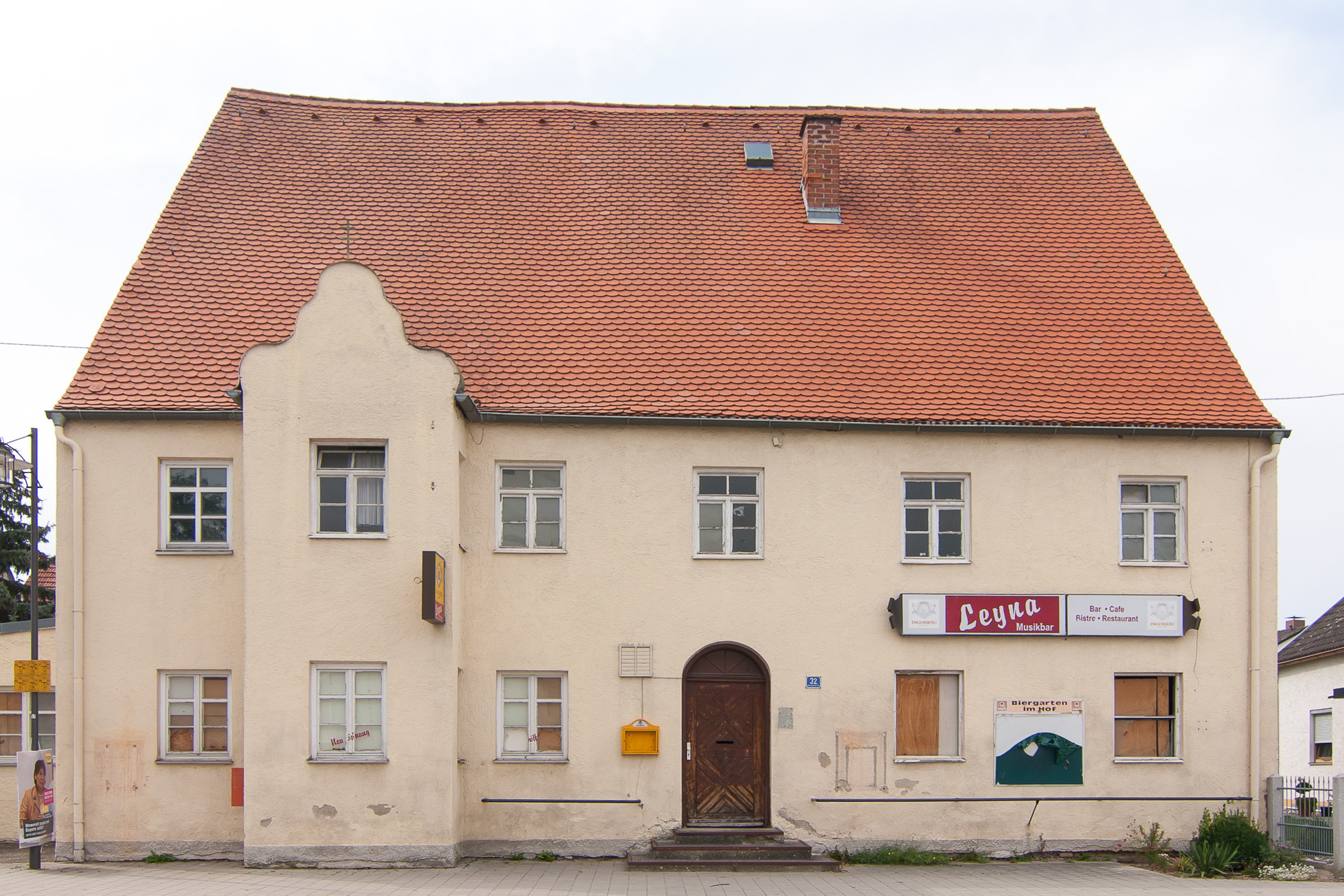 Gasthaus Grüner Kranz; 17./18. Jahrhundert schmiedeeiserner Ausleger, barock.This is a photograph of an architectural monument.